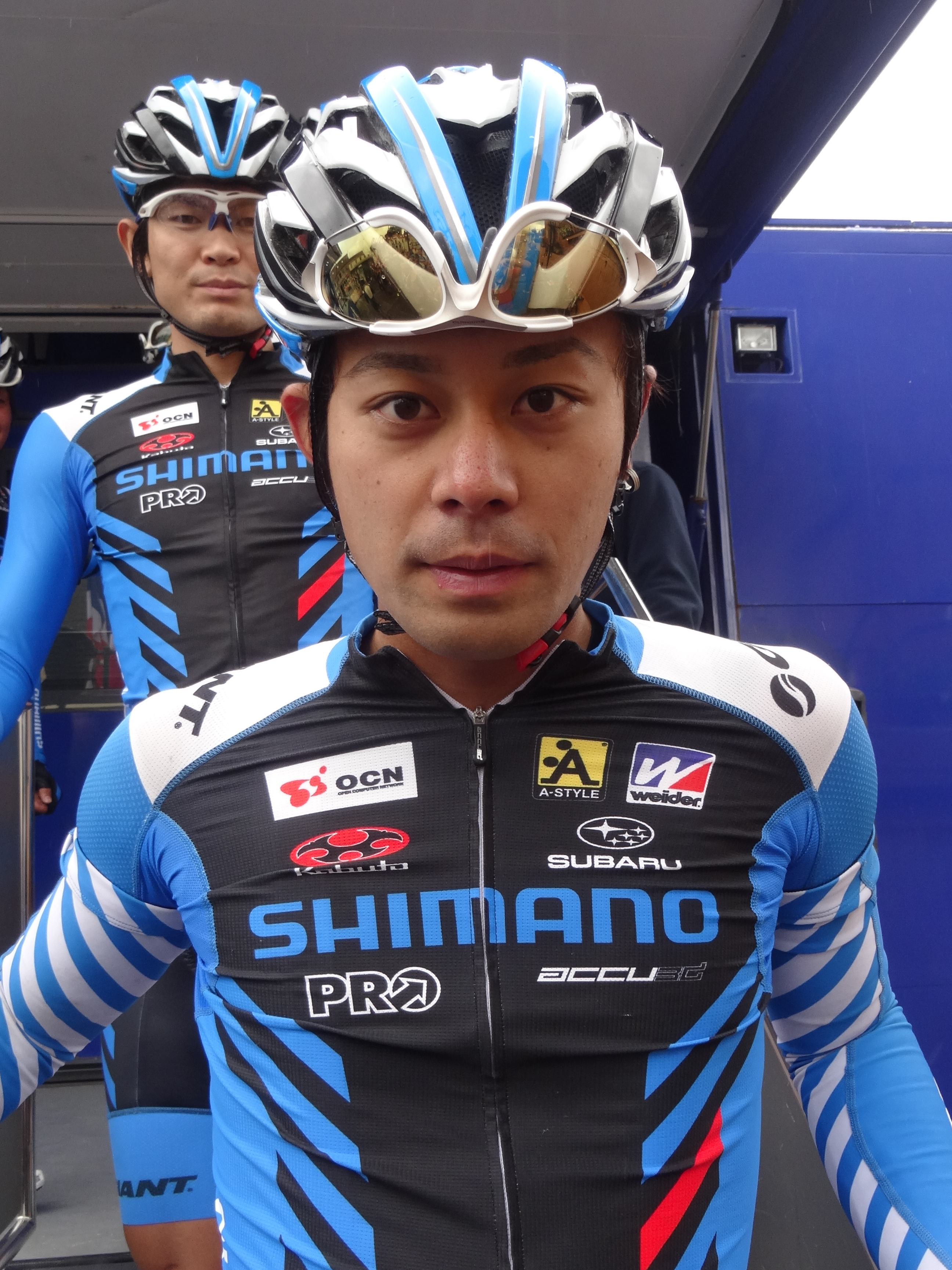 Reportage photographique réalisé le dimanche 13 juillet à l'occasion du départ et de l'arrivée de la Ronde pévéloise 2014 à Pont-à-Marcq, Nord-Pas-de-Calais, France.